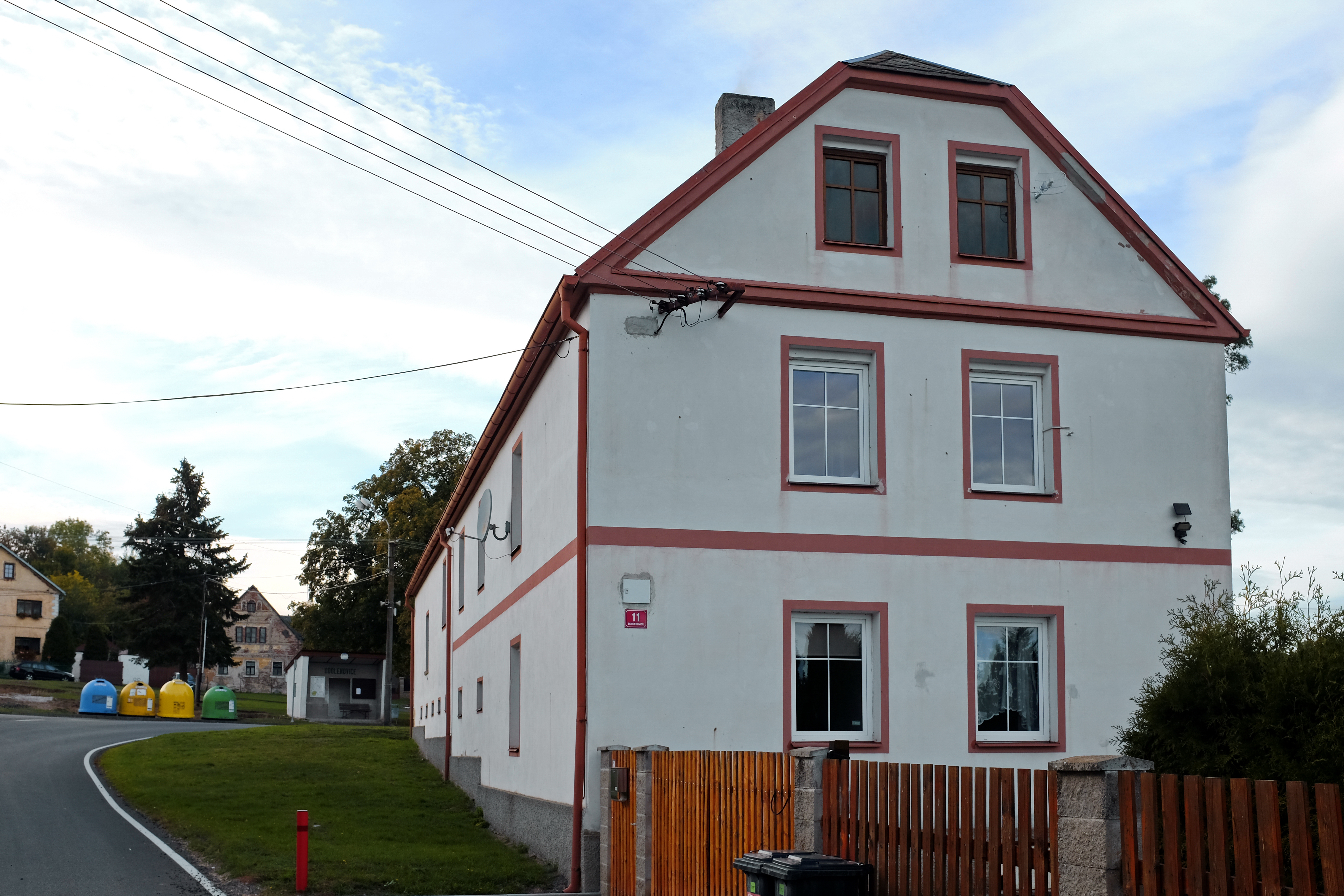 Odolenovice, část města Krásné Údolí, dům ve vesnici, okres Karlovy Vary